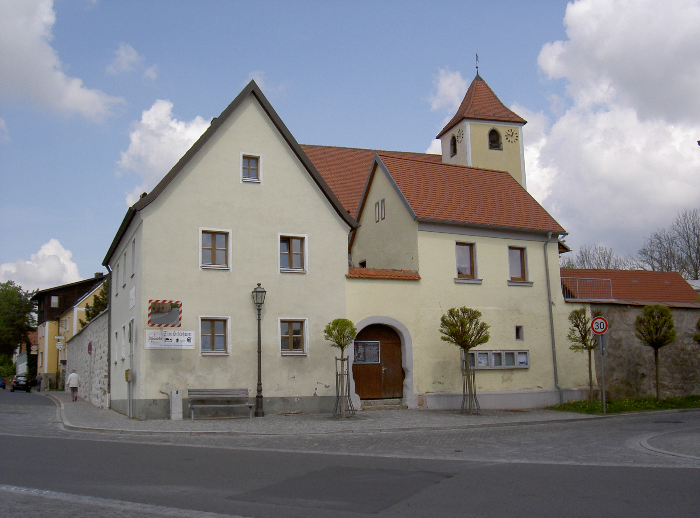 Altenstadt Torbogen, Aufgang zur Kirche